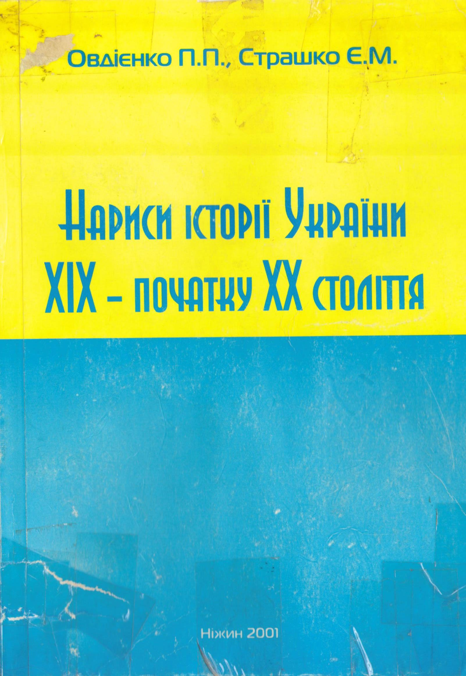 фото